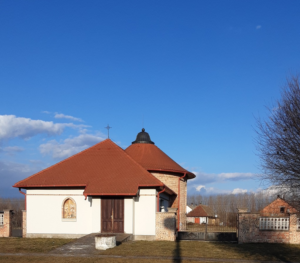 Kesznyéten település Római katolikus temploma